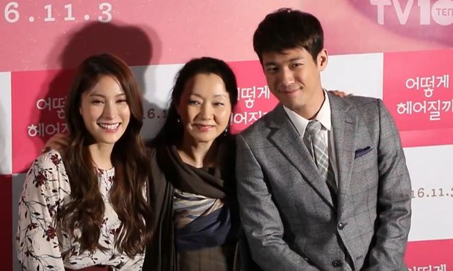 [TV10] 10월 24일 영화 '어떻게 헤어질까' 언론시사회 현장